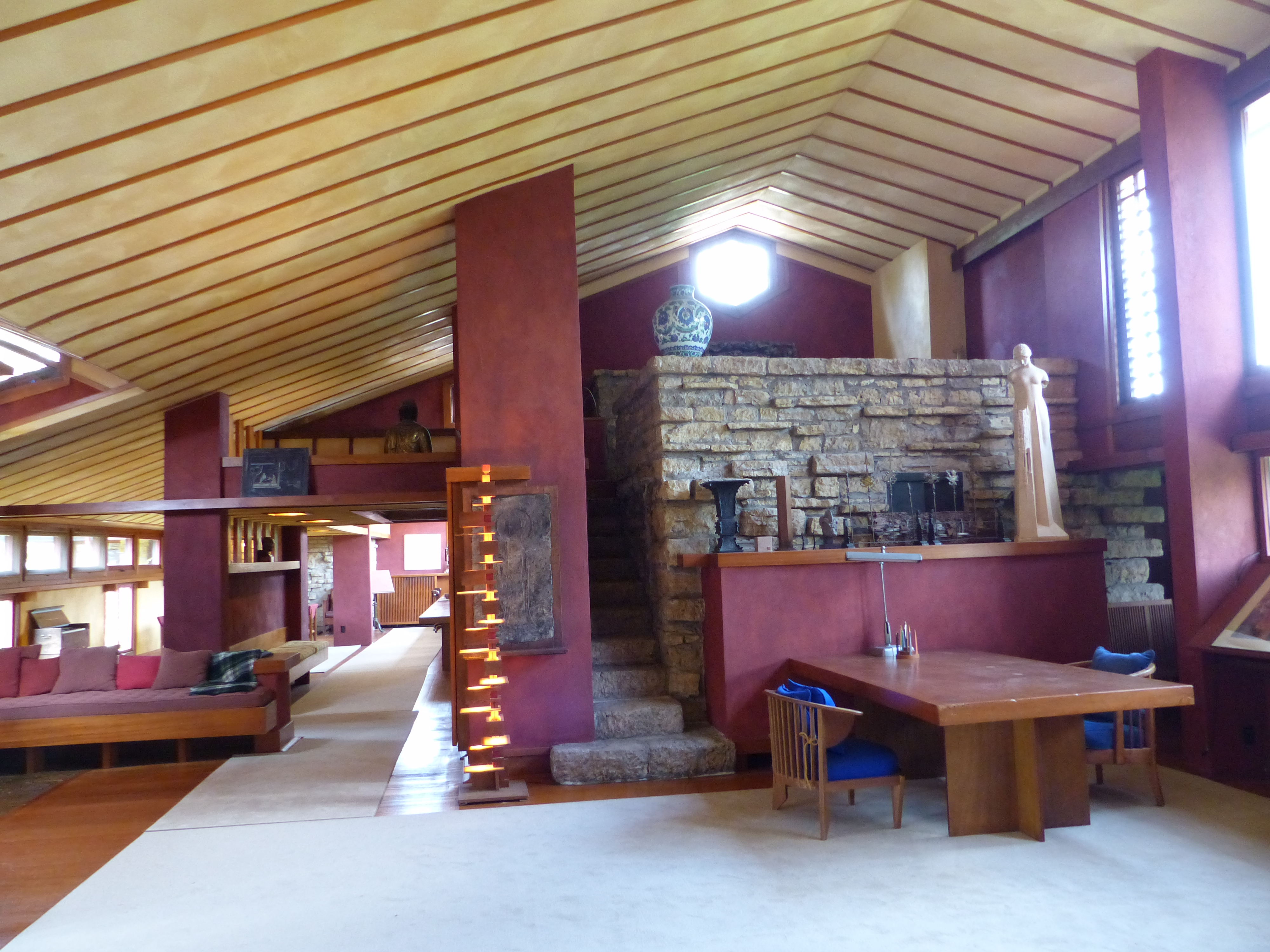 Frank Lloyd Wrights persönliches Studio in Taliesin, Spring Green, Wisconsin